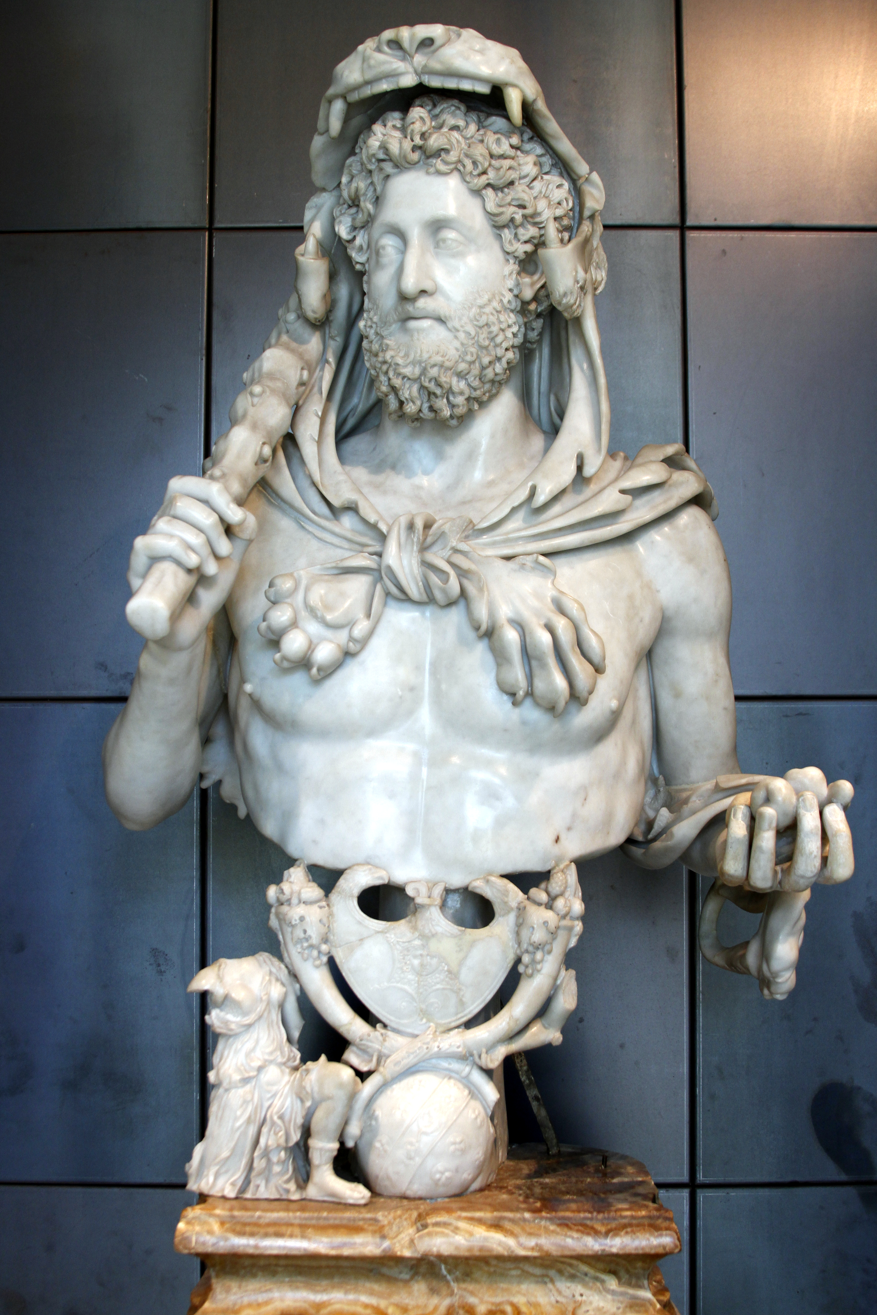 Musei Capitolini - Rome